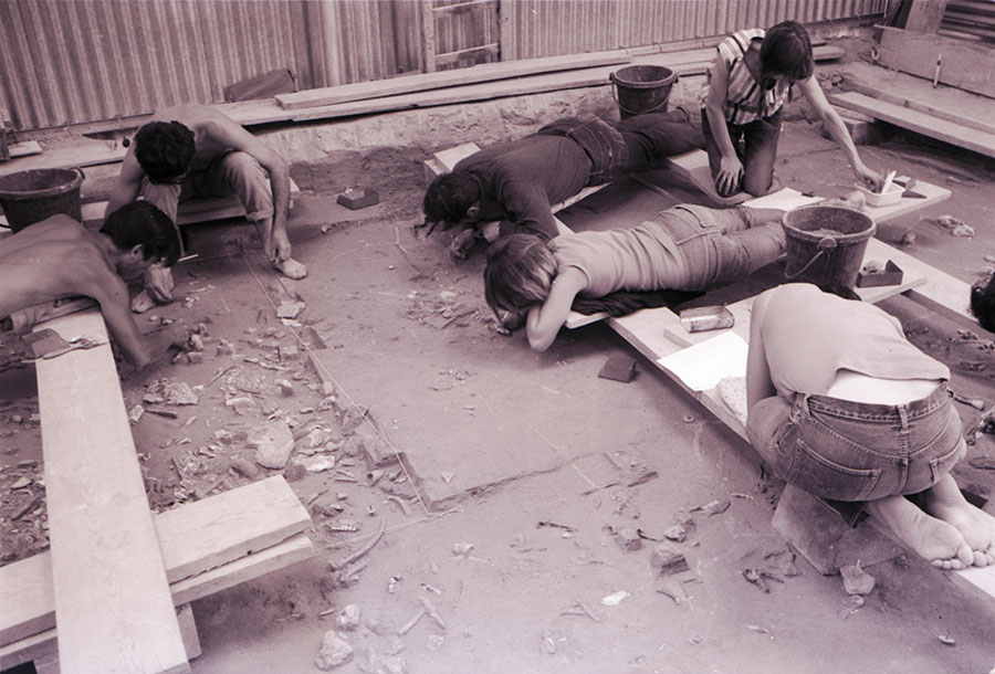 Les archéologues au travail à Pincevent